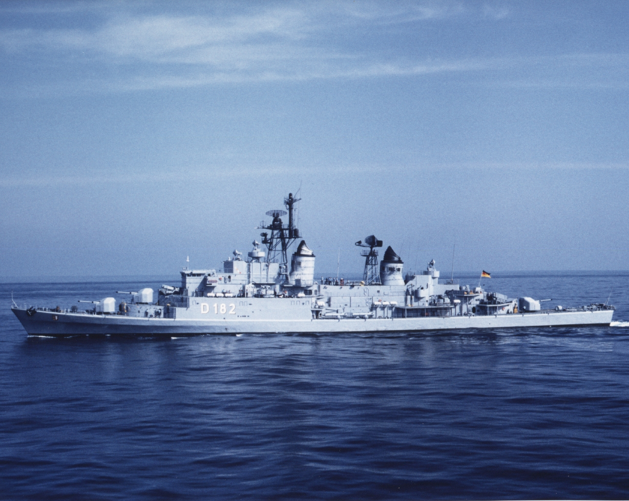 Zerstoerer Schleswig-Holstein in See (Mittelmeer)